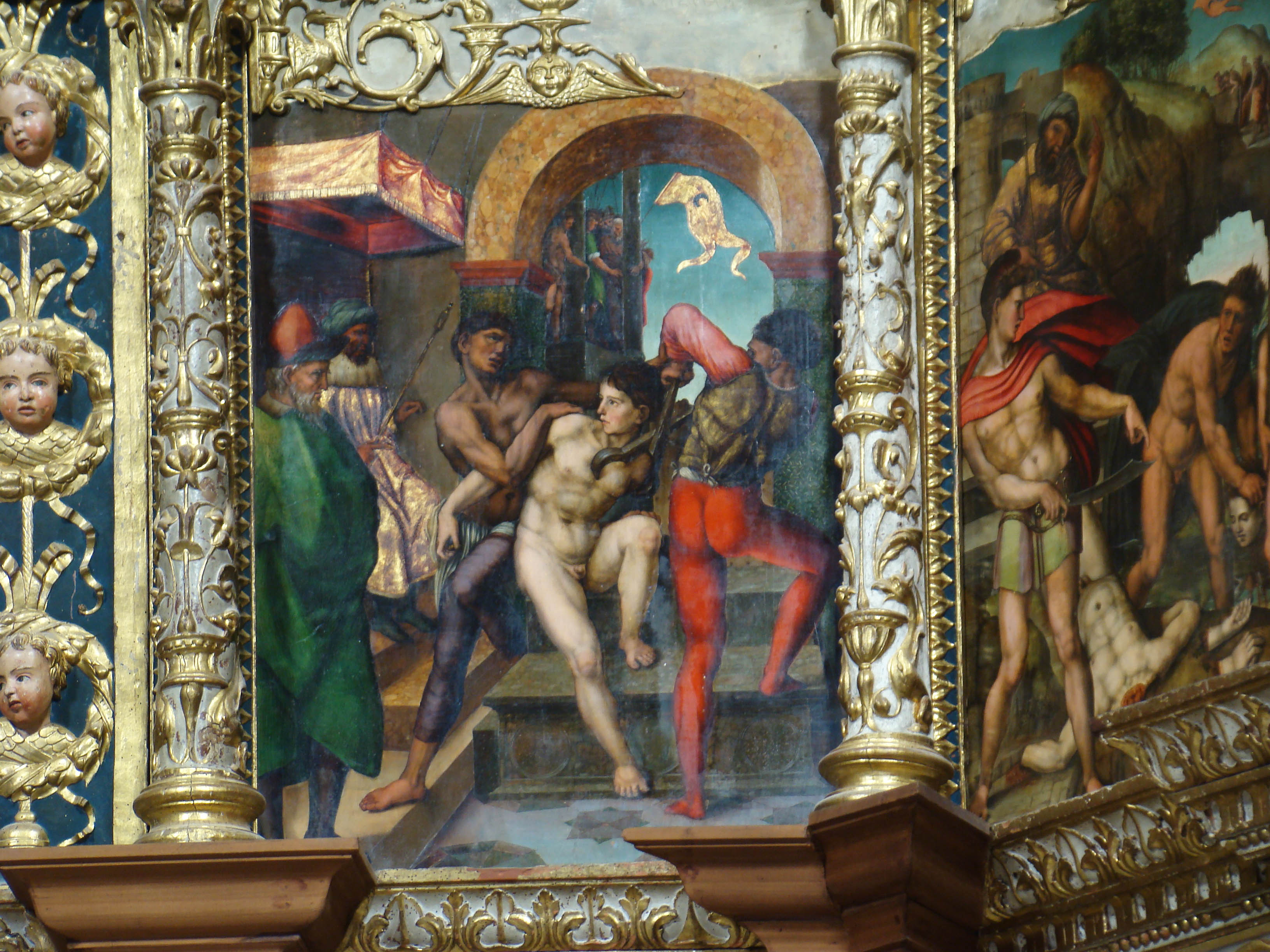 Iglesia de San Pelayo en Olivares de Duero (Valladolid, España). Estilo gótico, segunda mitad del siglo XV. Retablo de San Pelayo. Pinturas sobre tabla de Juan de Soreda. Tortura del santo.